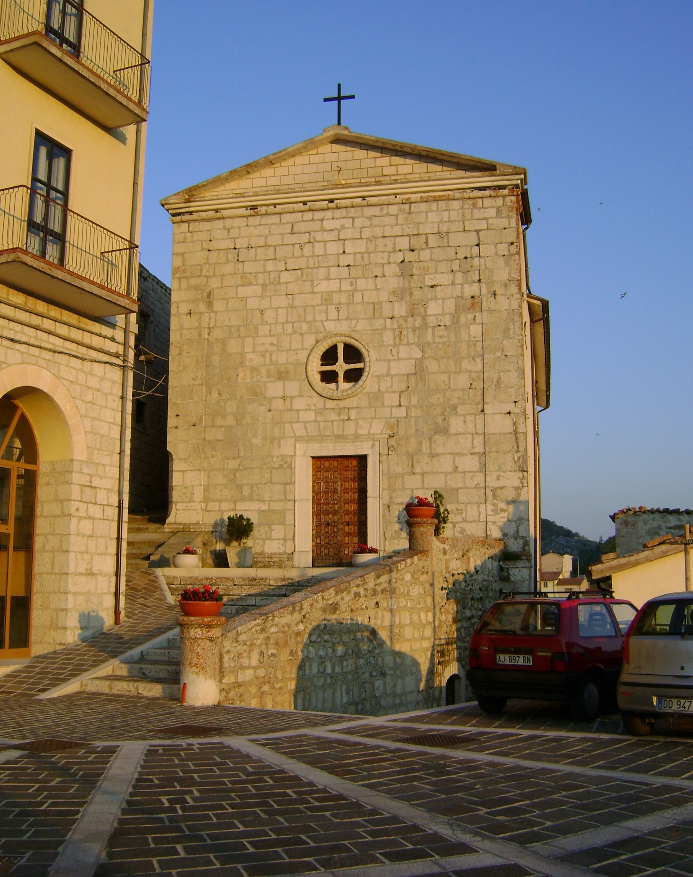 Chiesa madre di San Martino. Montenerodomo, Chieti.